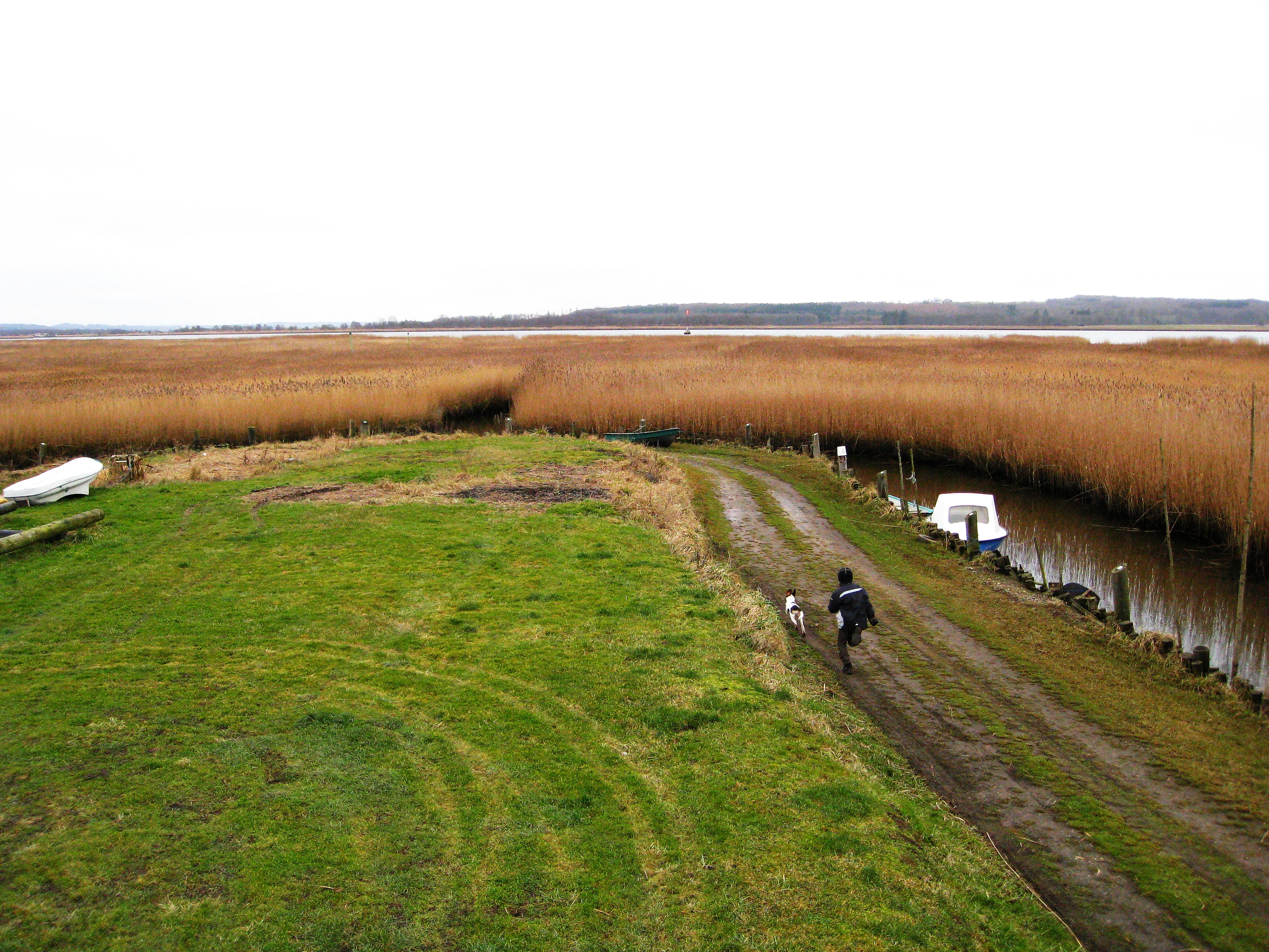 Randers Fjord, siv